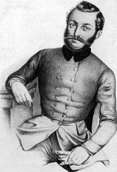 Avram Iancu. Portret de epoca.